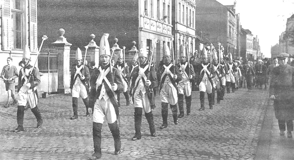 Bildbeschreibung: Erste Teilnahme des Beueler Stadtsoldaten-Corps 1936 am Karnevalszug in Beuel